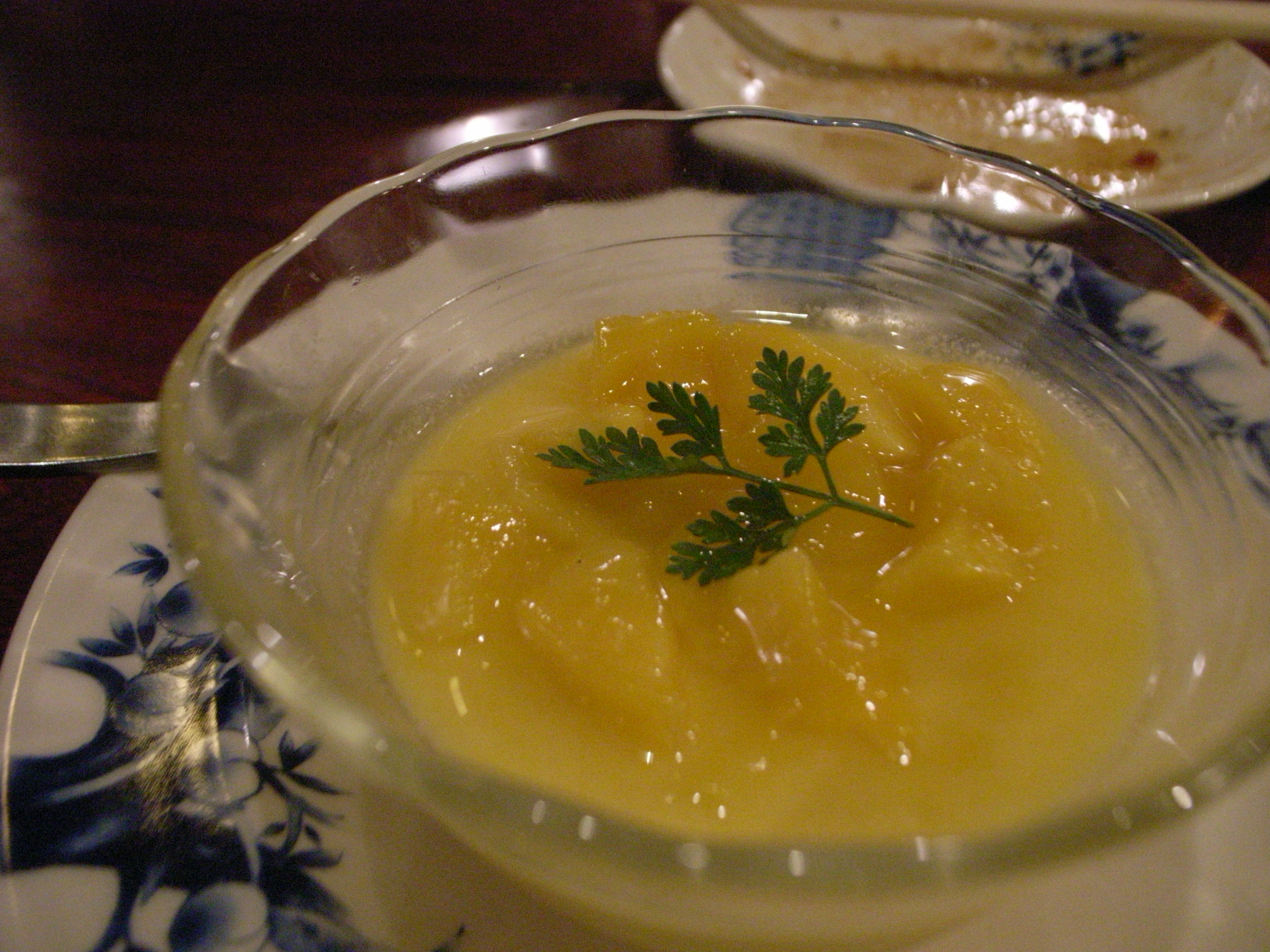 マンゴープリン